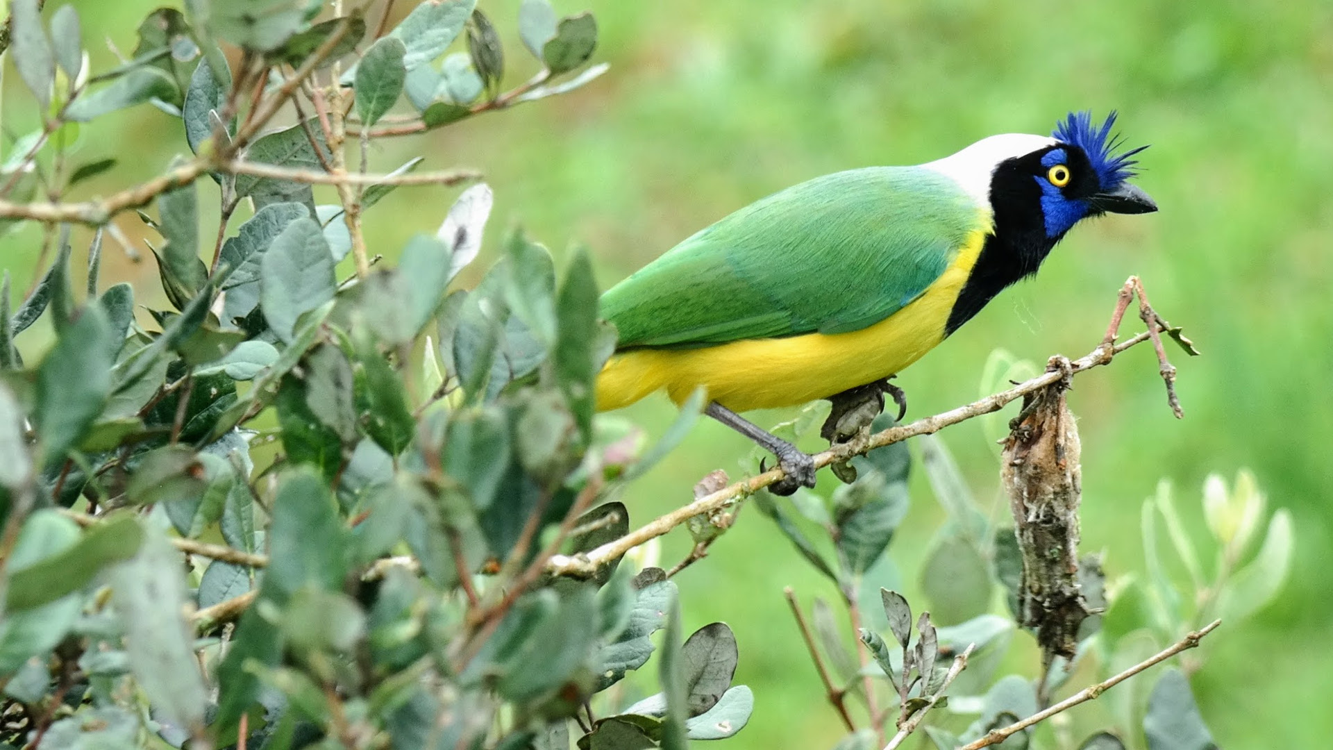 Cyanocorax Yncas sobre la rama de un arbusto de Feijoa sellowiana. Avistado en Guarne, Antioquia - Colombia.